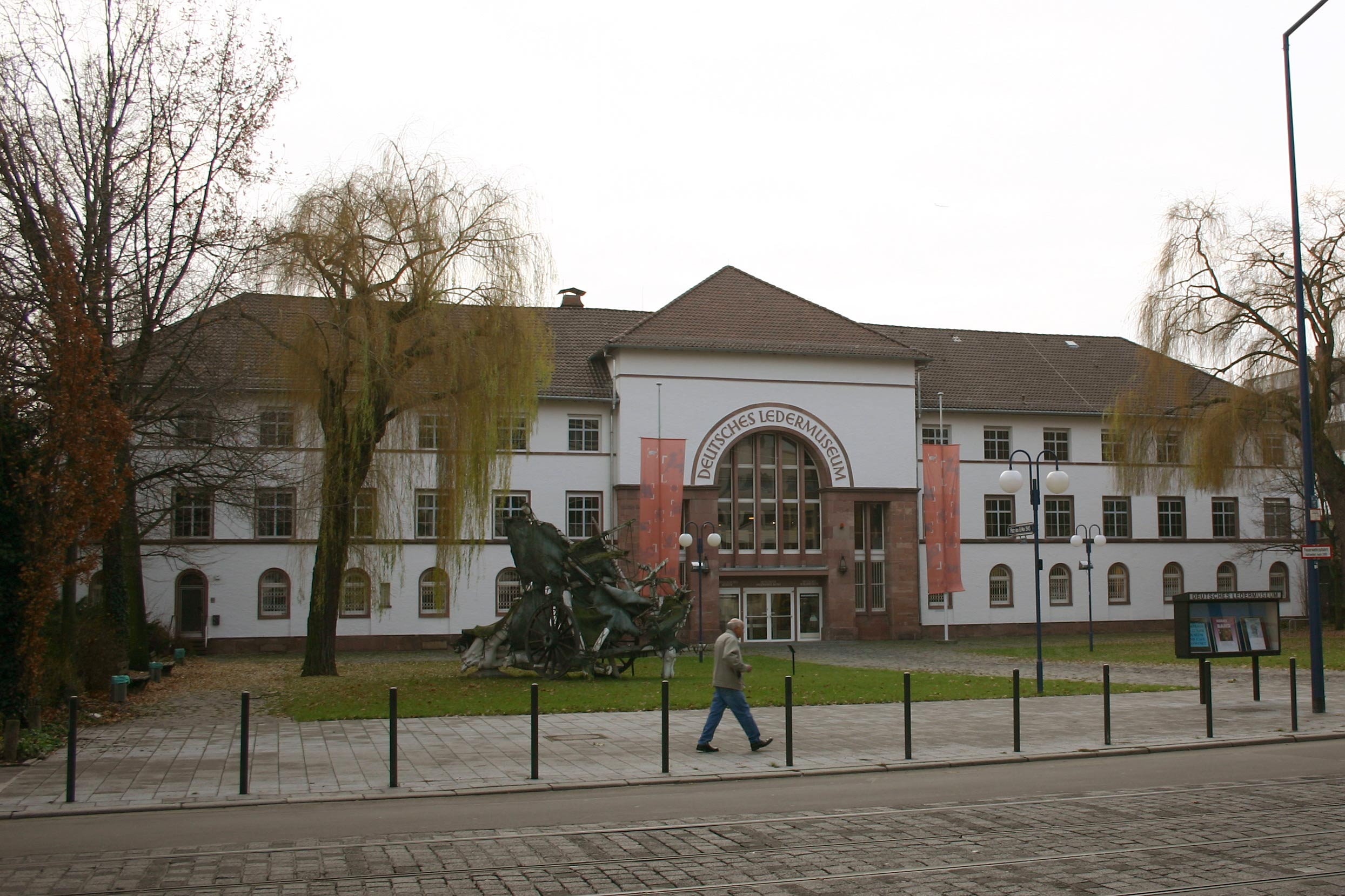 Deutsches Ledermuseum in Offenbach